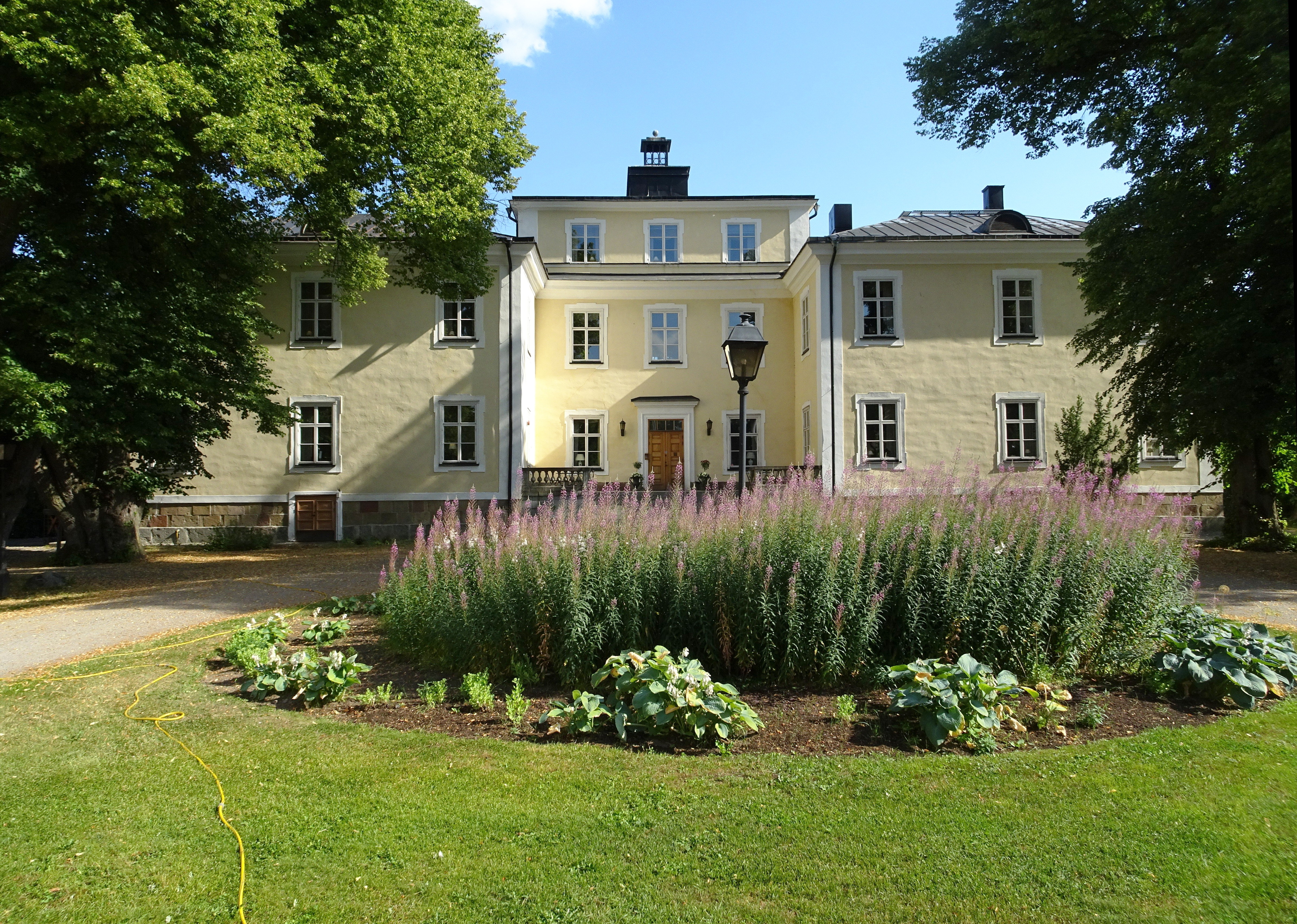 Haga slott, Enköping, huvudbyggnad